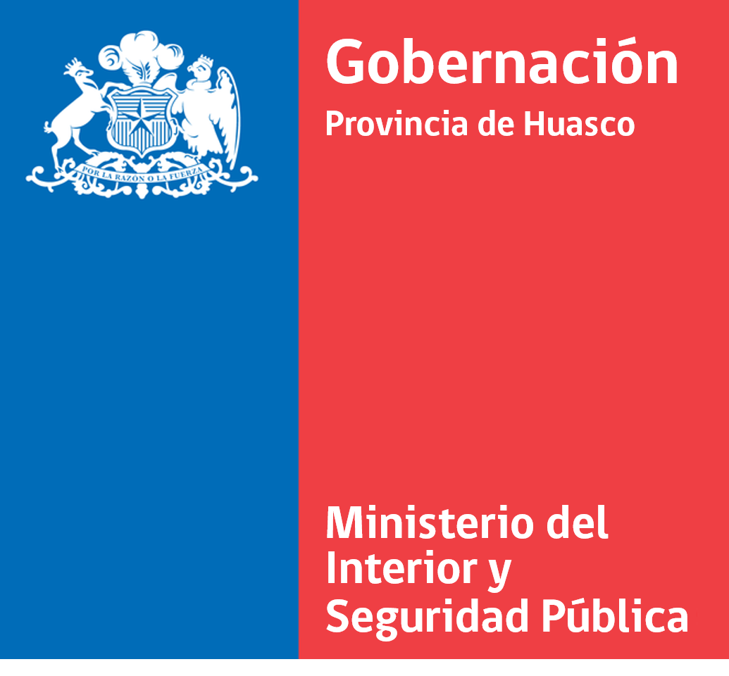 Logotipo de la gobernación provincial, usado desde 2010, durante la administración de Sebastián Piñera.